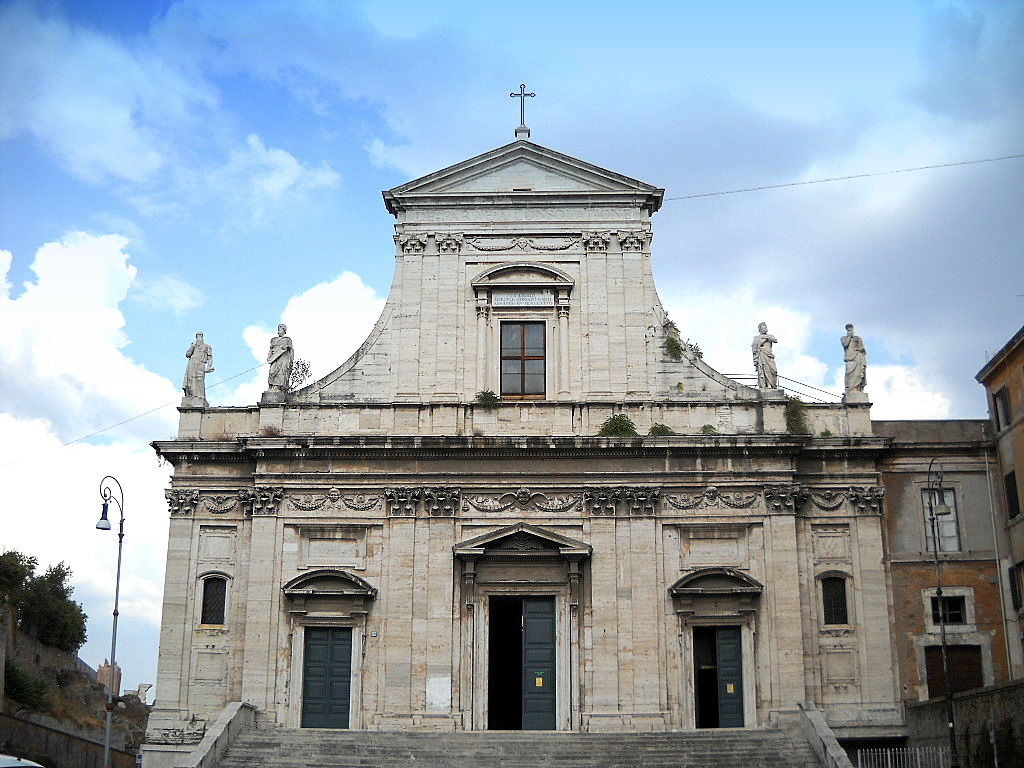 Chiesa di Santa Maria della Consolazione.